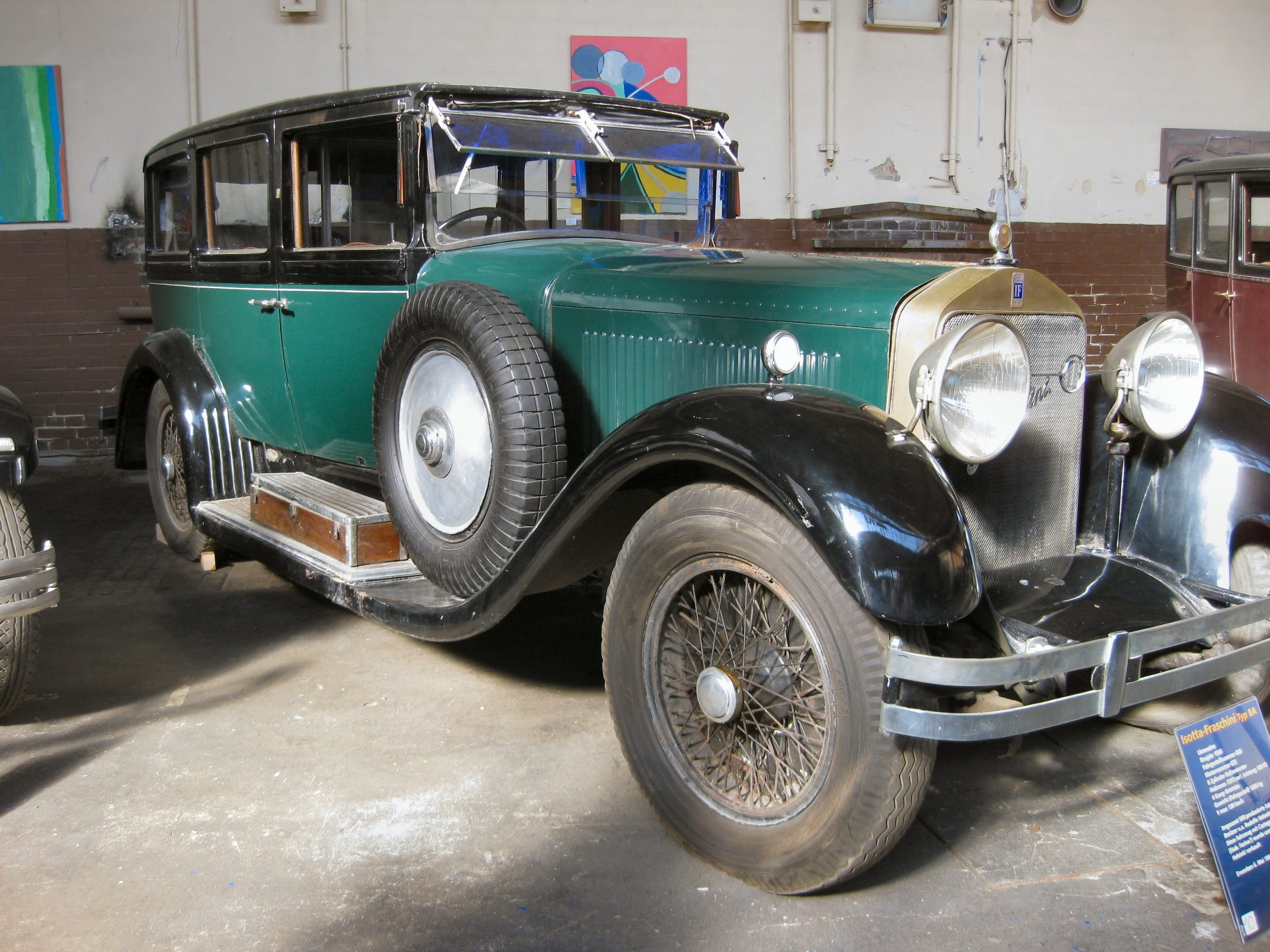 Isotta Typ 8A (Country of origin: Italy) aus der Sammlung Schlumpf